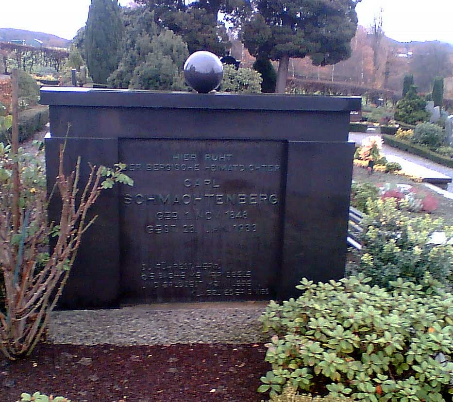 Grab des Schriftstellers Carl Schmachtenberg